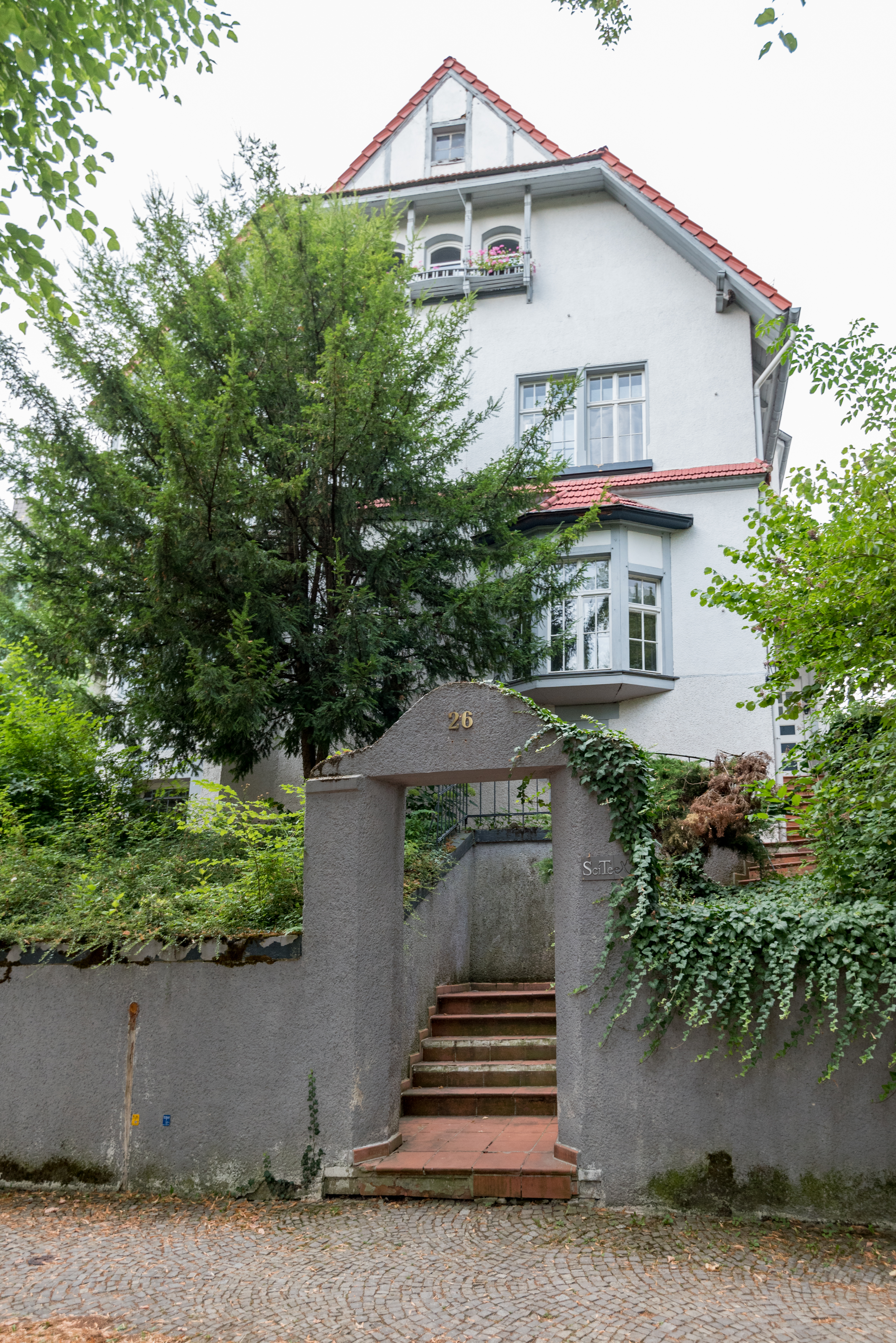 Naumburg (Saale), Buchholzstraße 26